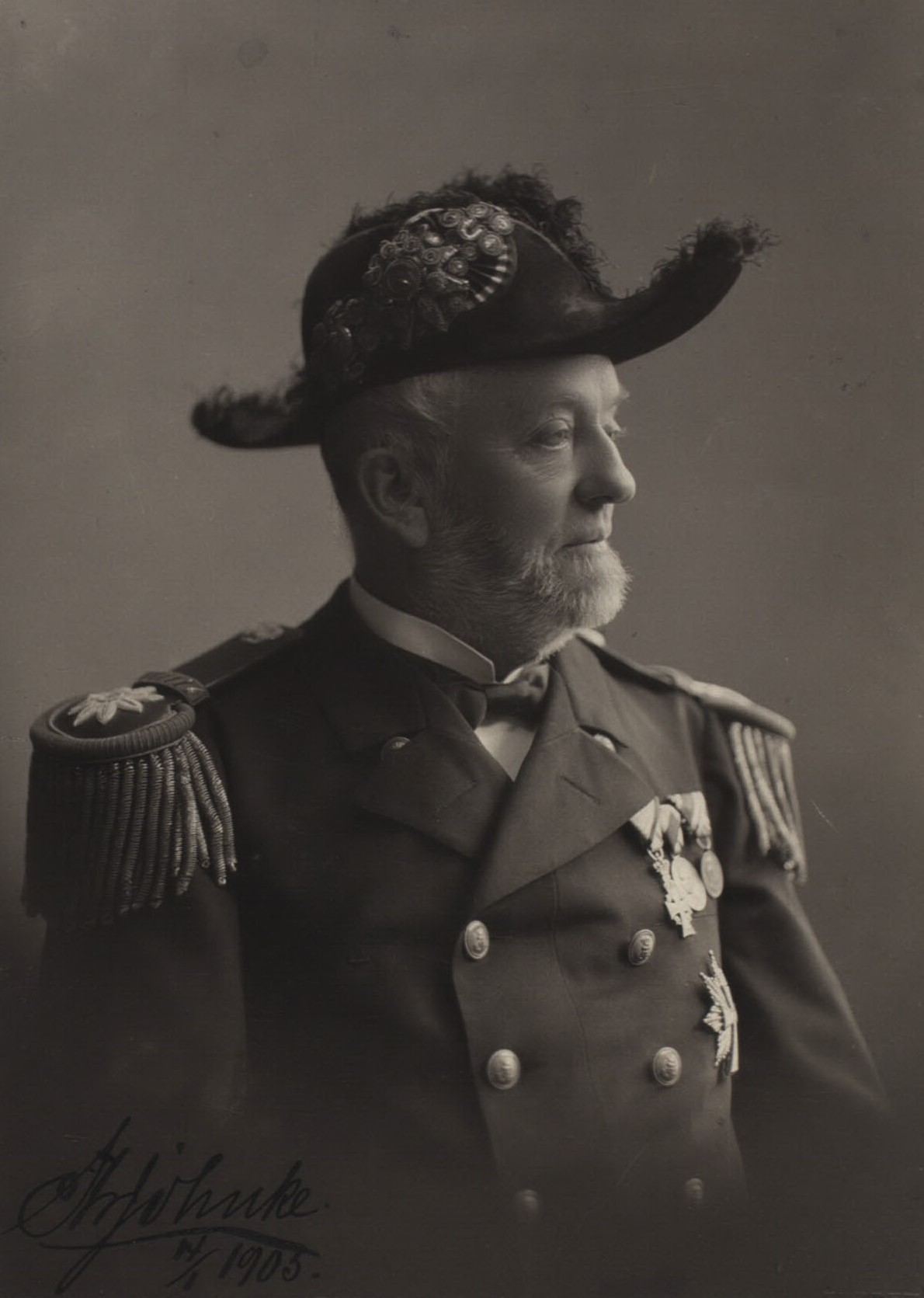 Ferdinand Henrik Jøhnke (født 11. maj 1837, død 1908) søofficer og minister.